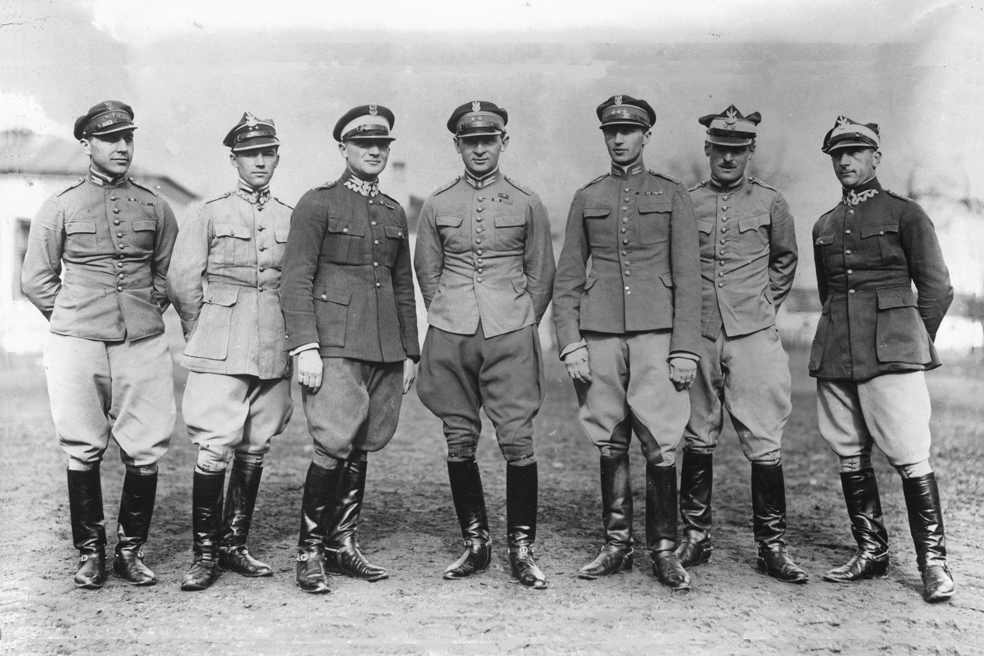 Grupa oficerów kawalerii - widoczni od lewej: rtm. Adam Królikiewicz, por. Władysław Zgorzelski, rtm. Henryk Dobrzański, ppłk. Karol Rómmel, rtm Zdzisław Dziadulski, por. Kazimierz Szosland, rtm. Edmund Chojecki. Reprodukcja.